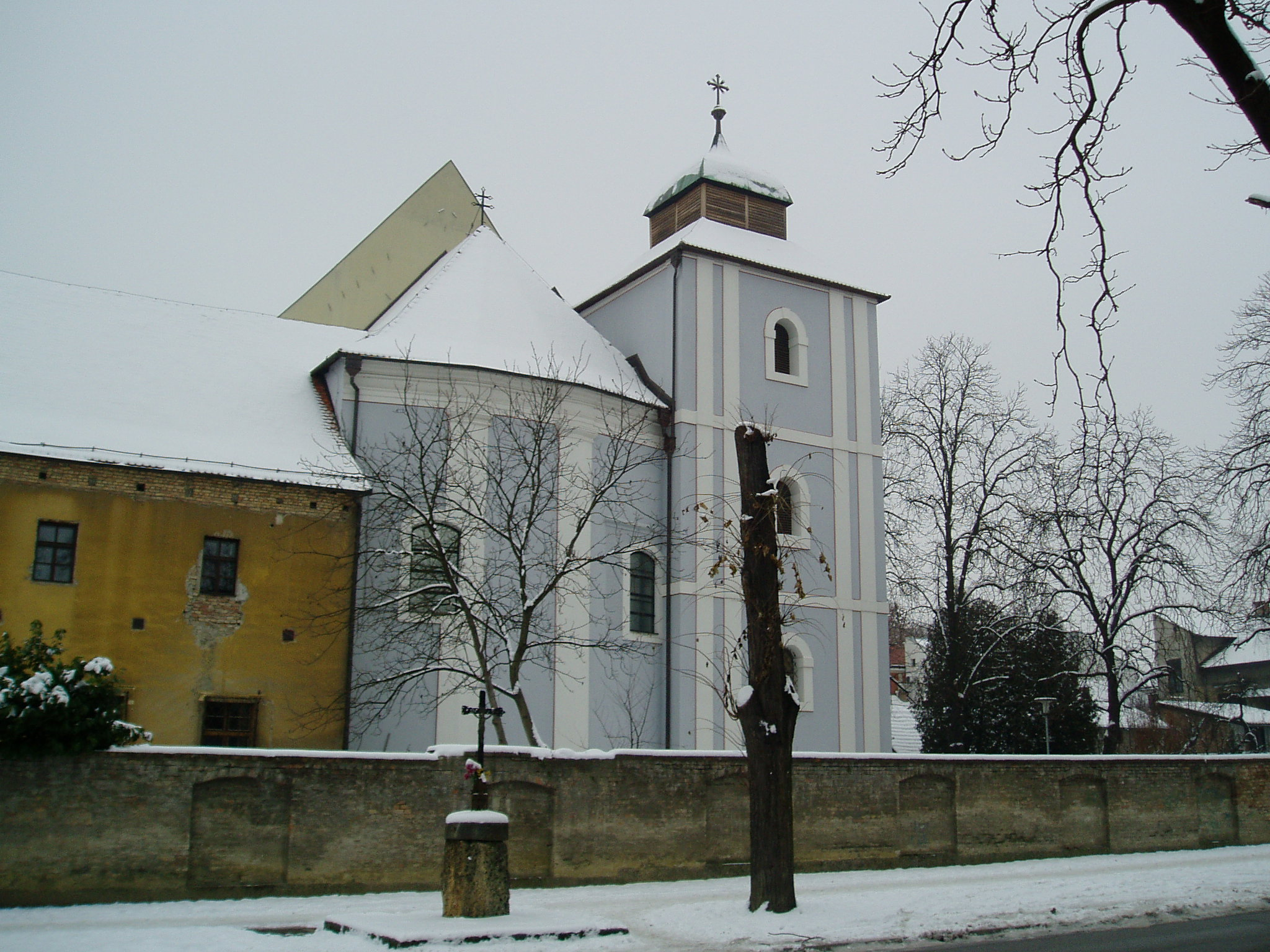 Slavonski Brod, Samostan